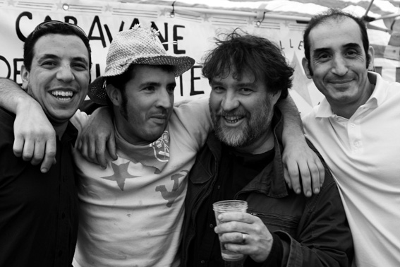 Bouli Lanners entouré par Boum, Hafid et Karim à la fête du Travail à Liège